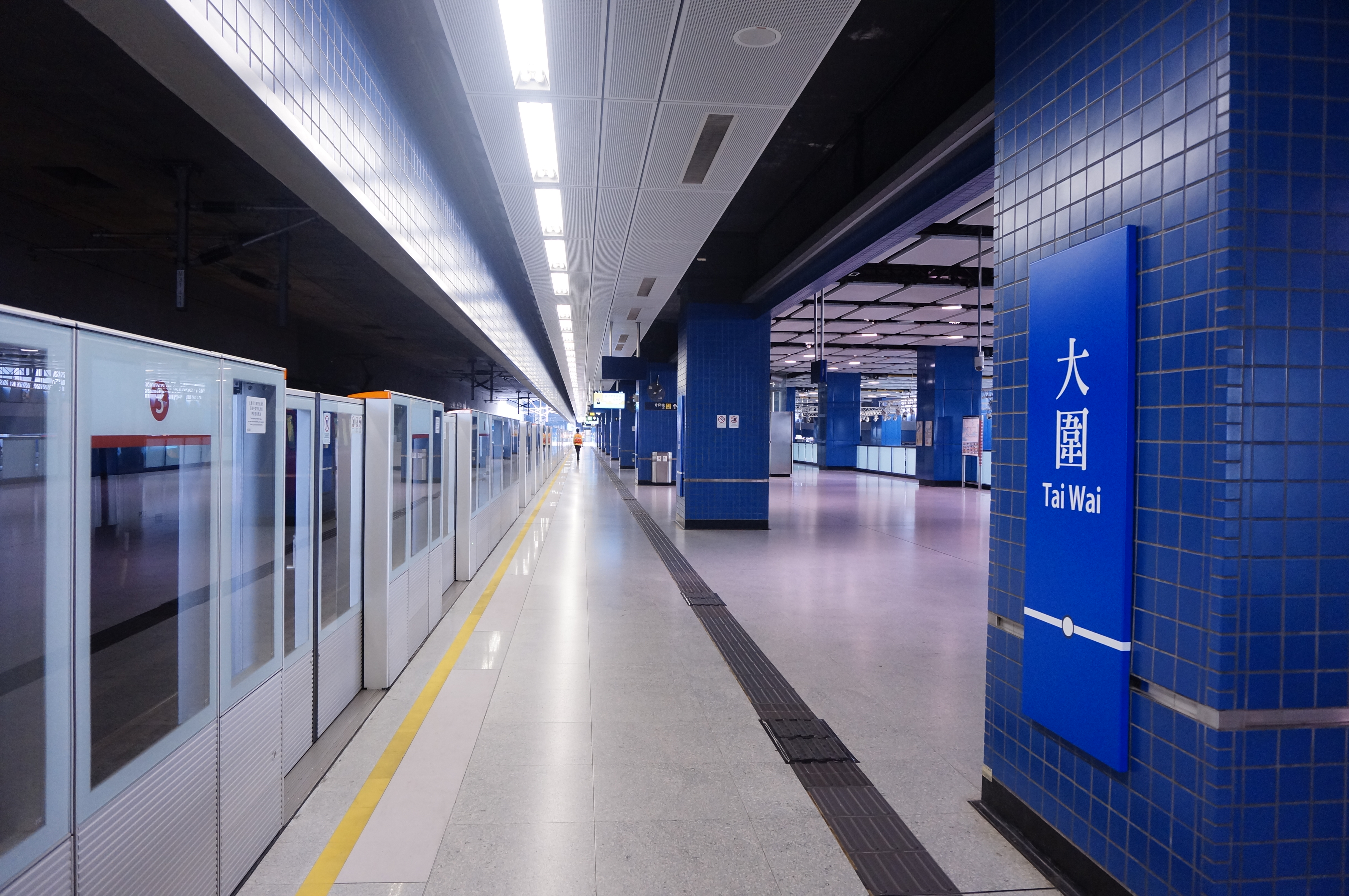 港鐵大圍站